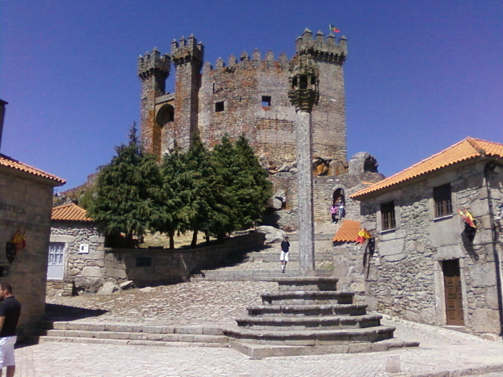 Castelo de Penedono